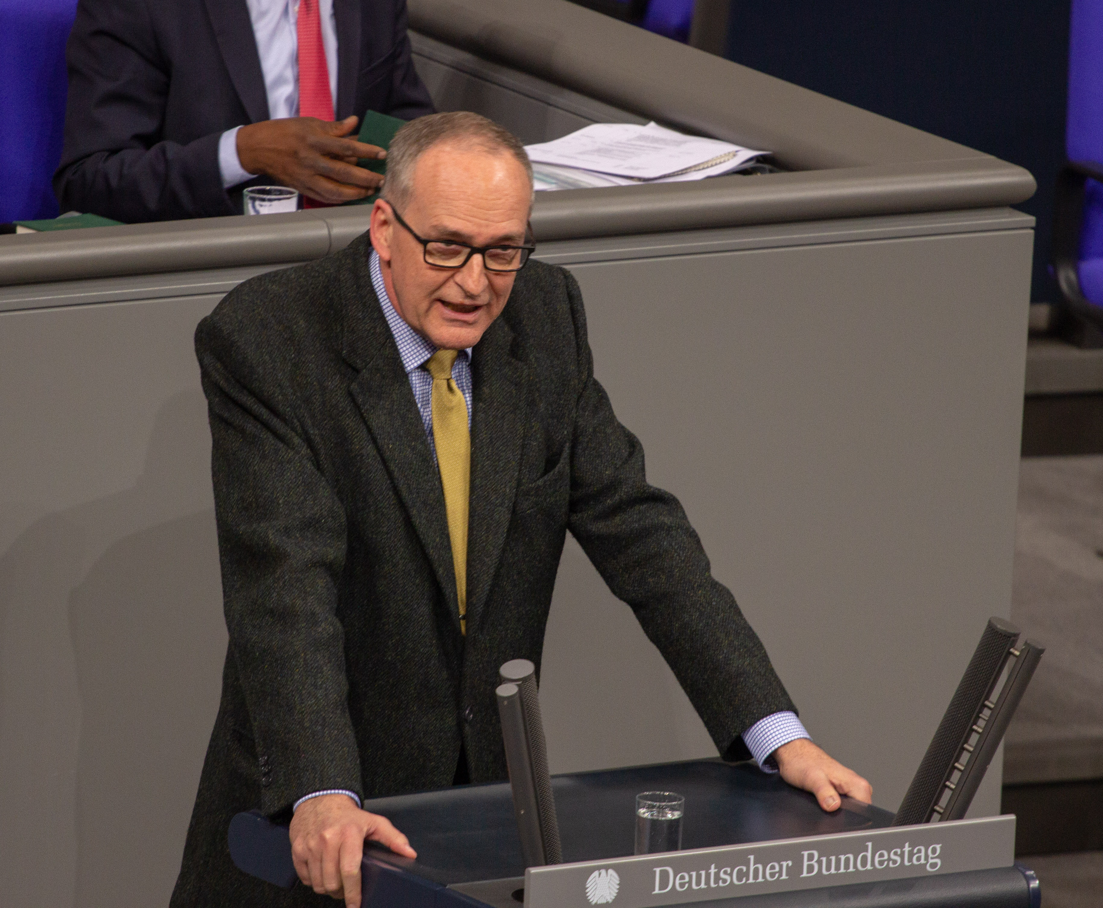 Roman Reusch, Mitglied des Deutschen Bundestages, während einer Plenarsitzung am 11. April 2019 in Berlin.